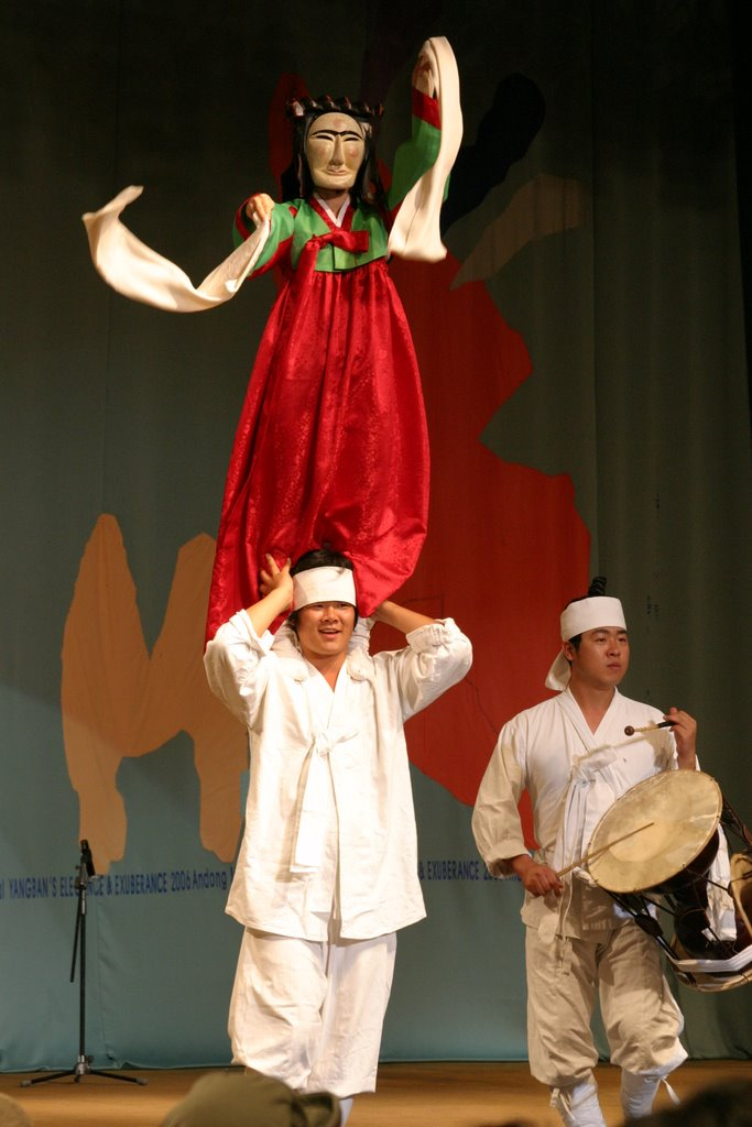 Hahoe Folk Village in Andong, Gyeongsangbuk-do, South Korea.